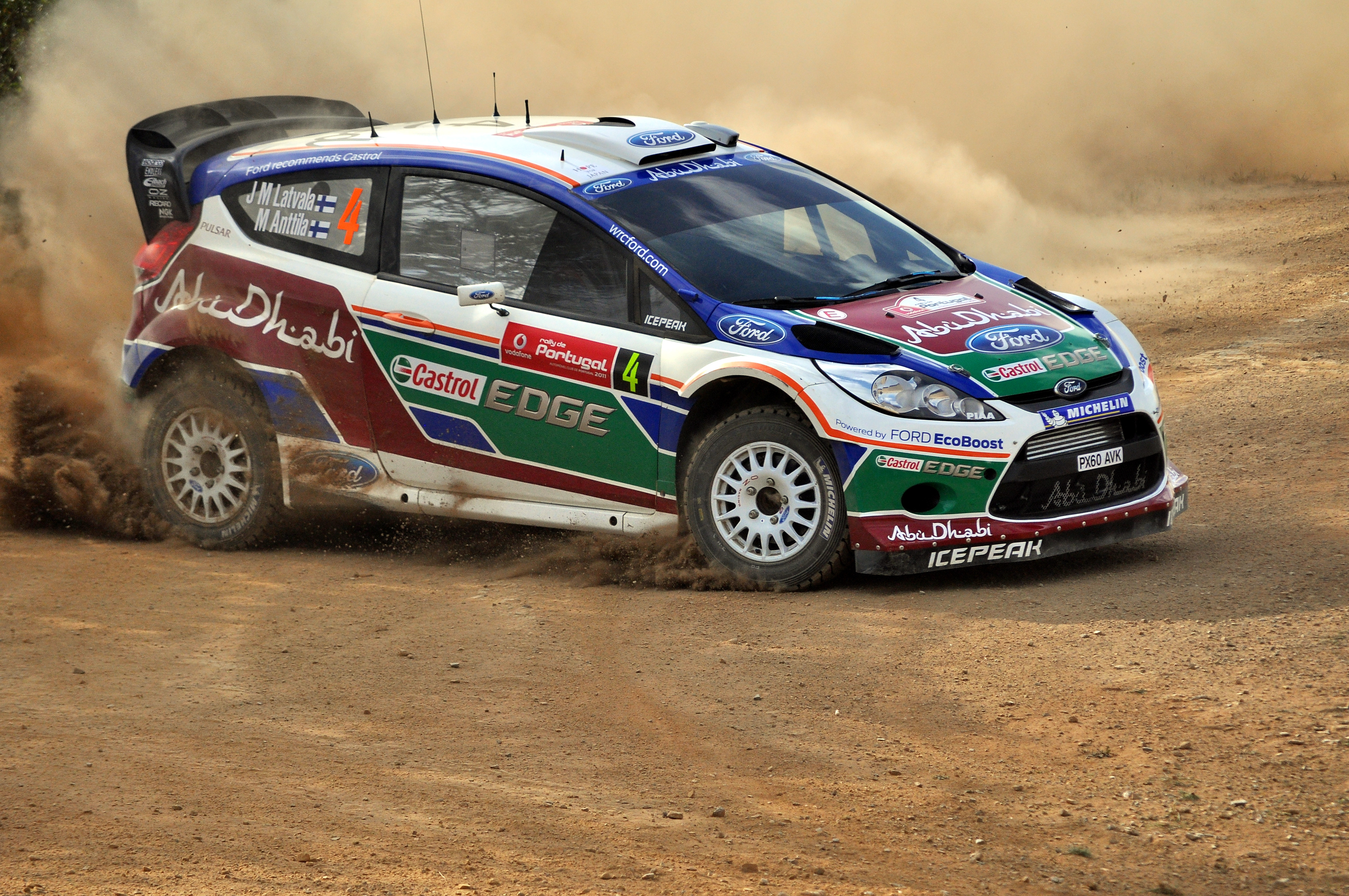 Vodafone Rally de Portugal 2011 - (Santa Clara) - Latvala